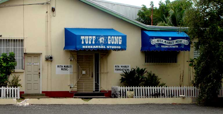 Tuff Gong. Foto: Dubdem e FabDub.